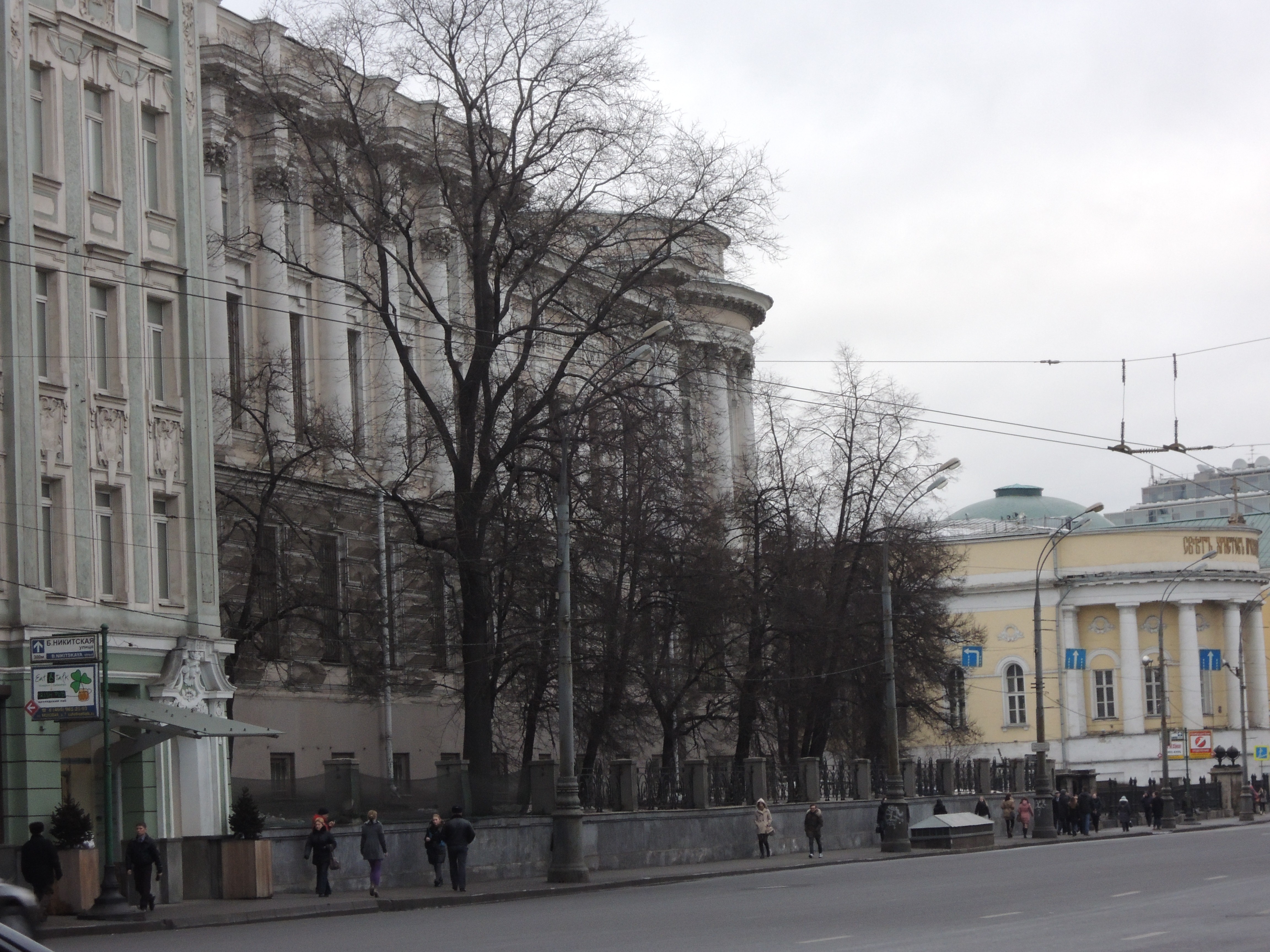 Моховая улица